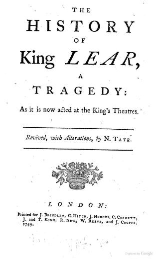 История за Крал Лир